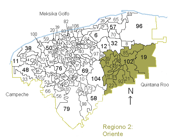 Mapo de la Regiono 2, Yucatán, Oriente Kategorio:Geografio de Yucatán